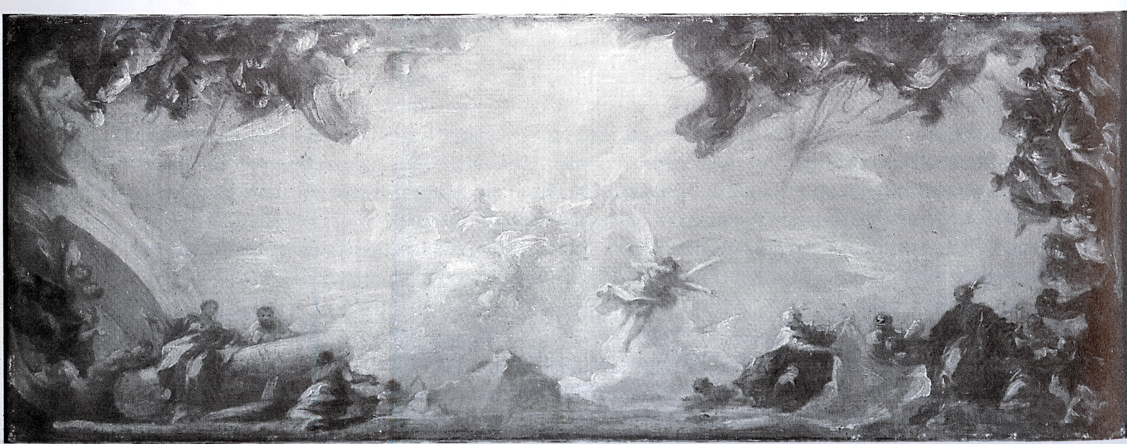 resden, Zwinger, Deutscher Pavillon, Deckenfresco von Giovanni Antonio Pellegrini, gemalt 1725 , zerstört 1849, The Four Continents, Museen der Stadt Köln, Sammlung Hagen